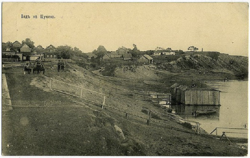 Вид на деревню Щукино. Открытка.